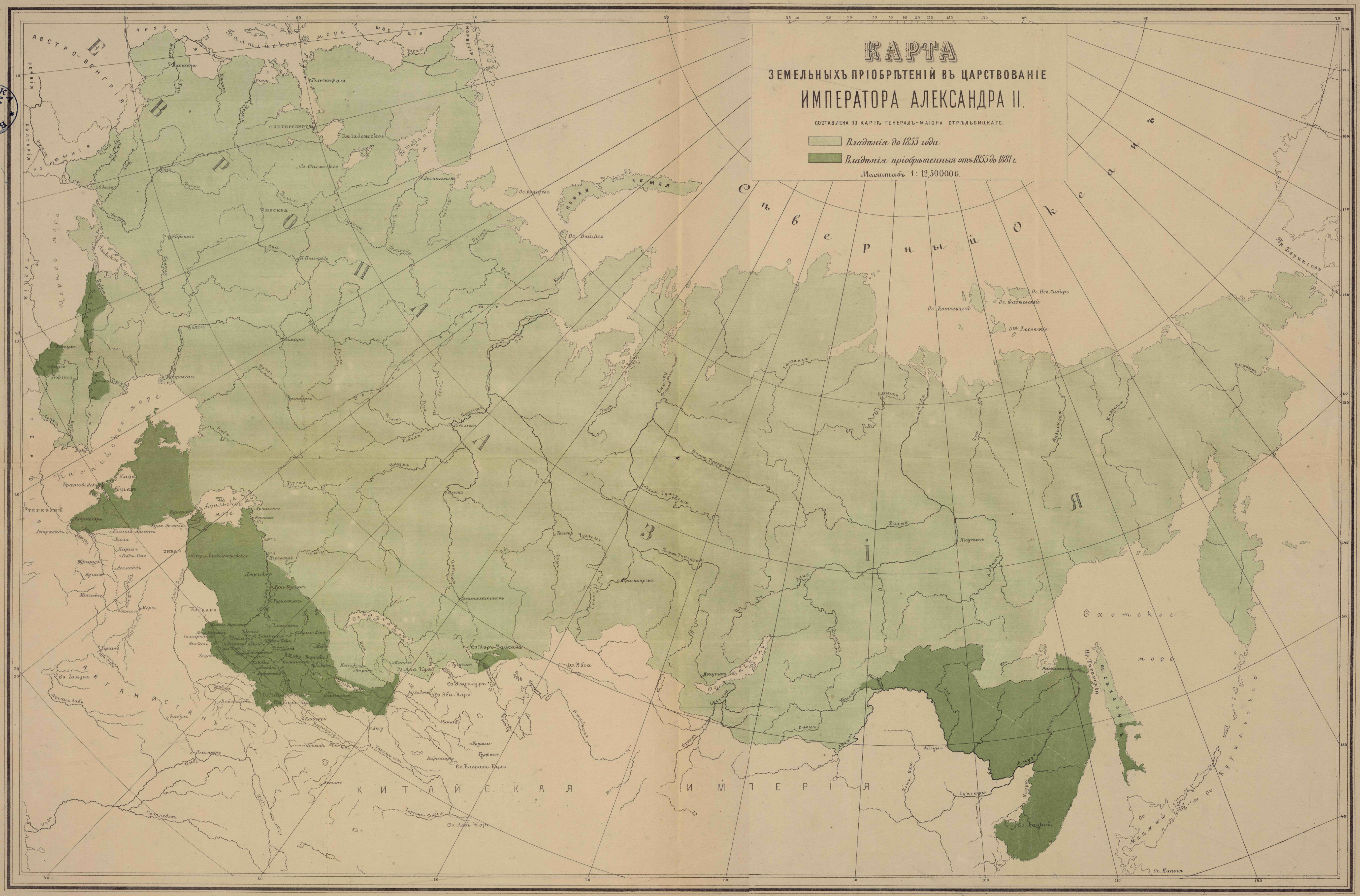 Карта земельных приобретений в царствование императора Александра II. Санкт-Петербург, 1882.